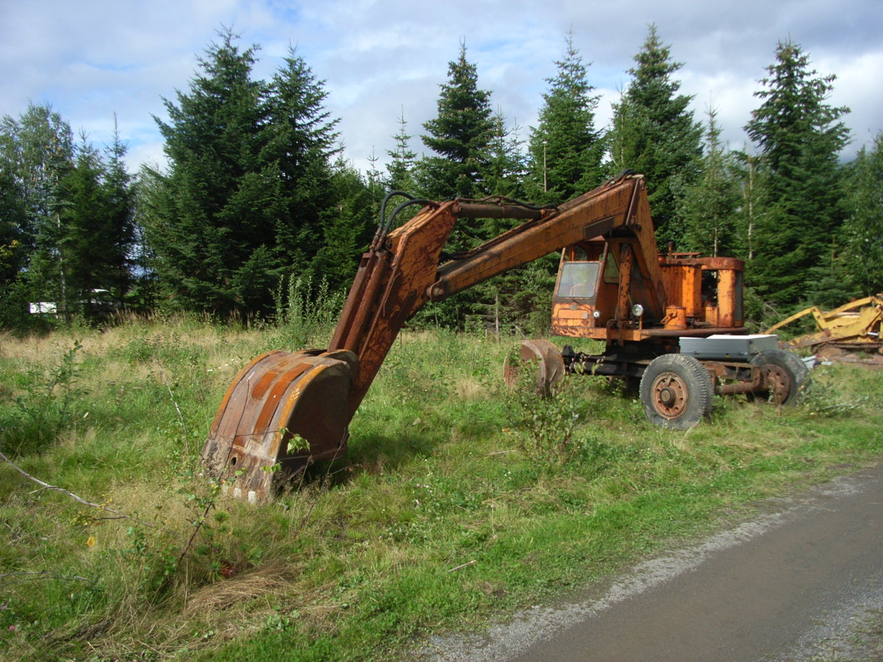 Brøyt hydraulisk gravemaskin